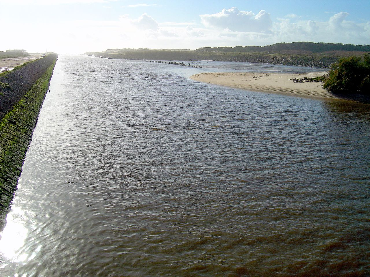 Foz do Rio Lis (Portugal)